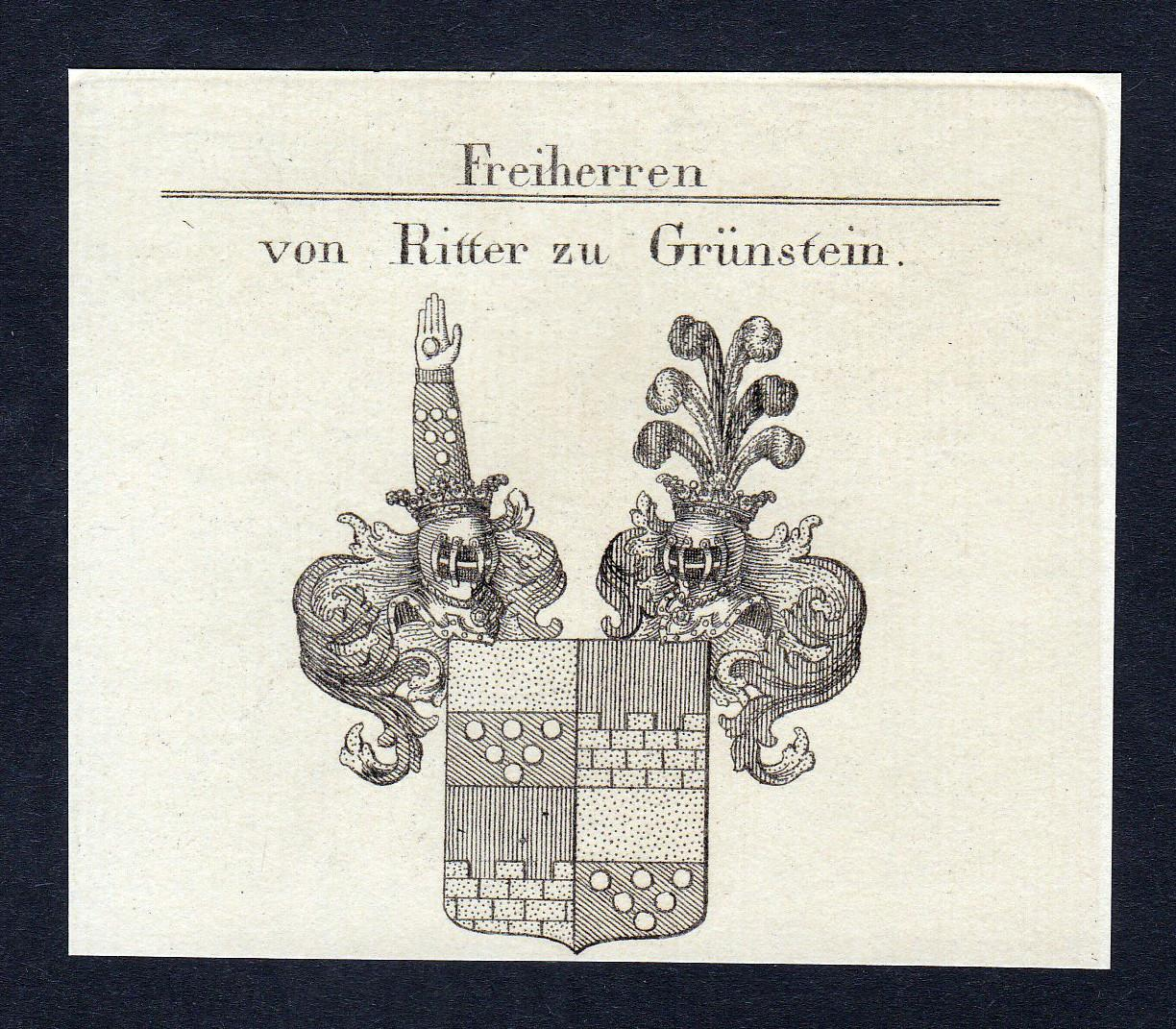 Wapenschild familie Groenstein